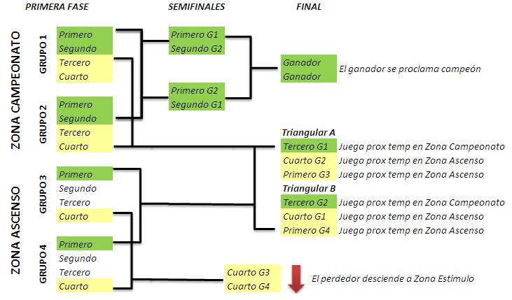 Cuadro que demuestra de forma sencilla como es el formato del Campeonato Argentino de Rugby del 2013